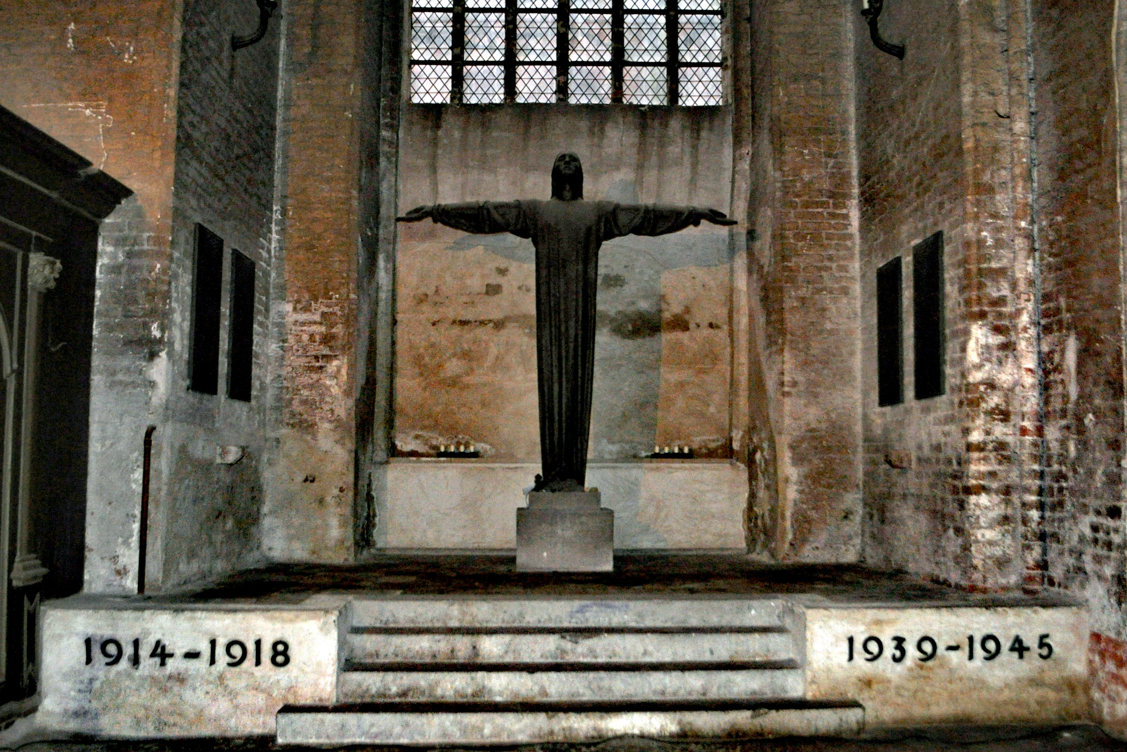 Stralsund, Nikolaikirche, Weltkriegsmahnmal (2012-12-29) 2, by Klugschnacker in Wikipedia